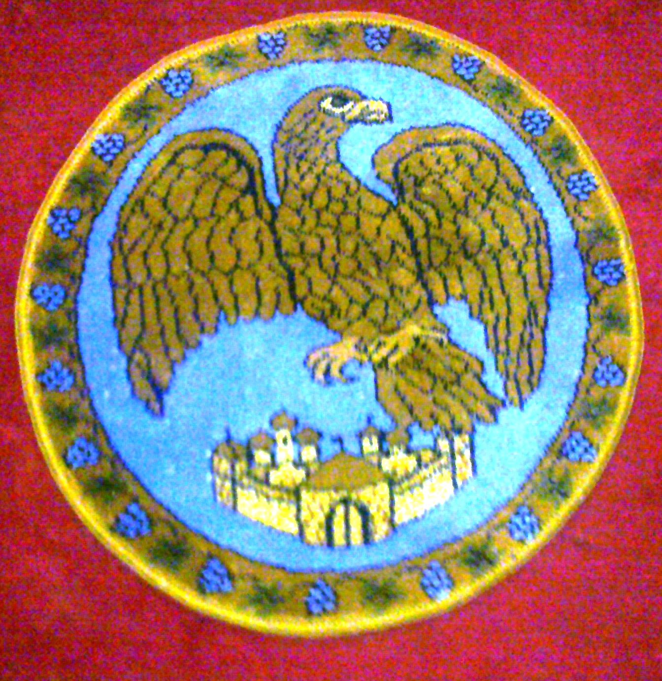 Ortodoksinen kotkamatto